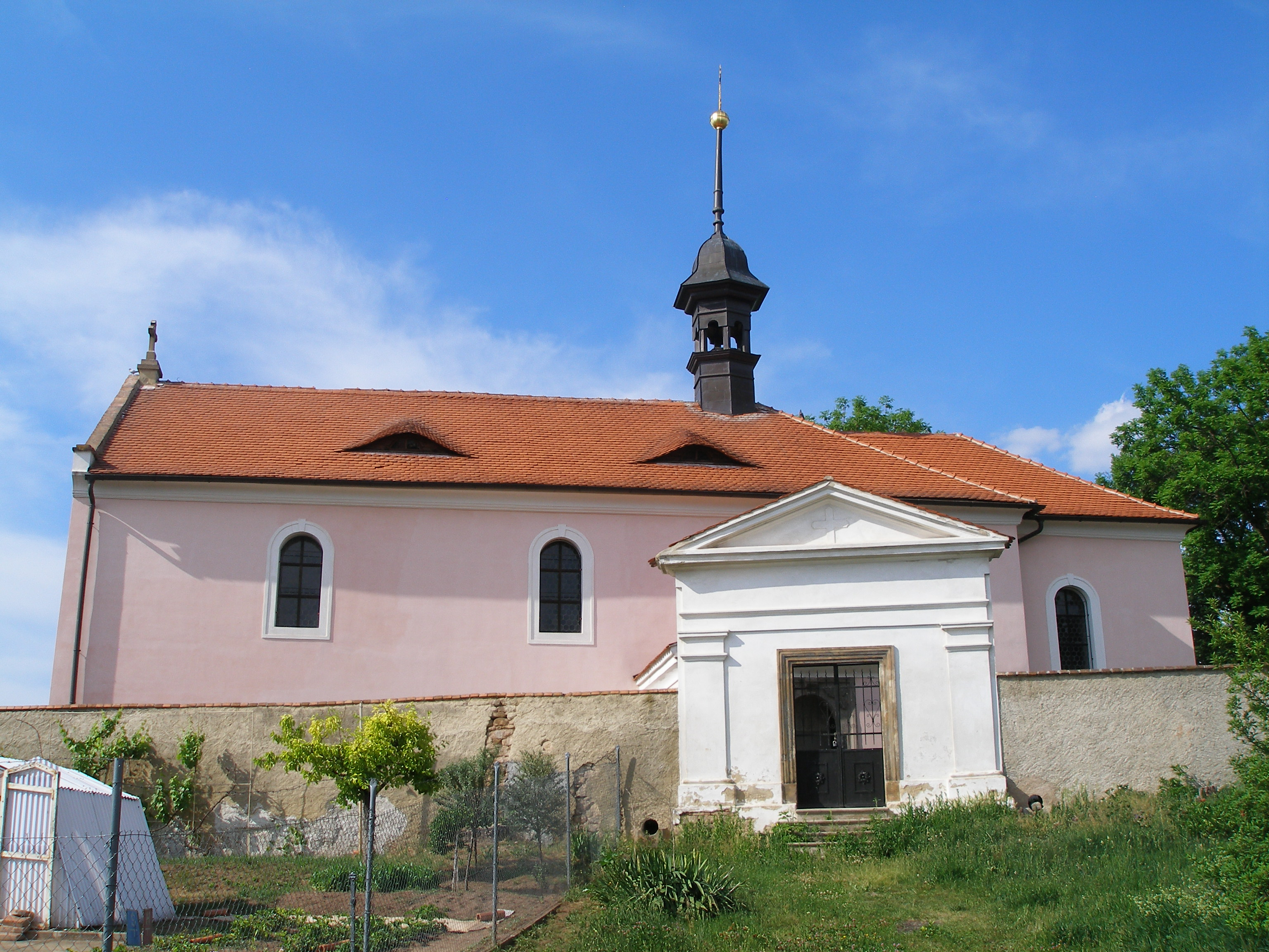 Kostel v Nabdíně.(pohled od jihu).